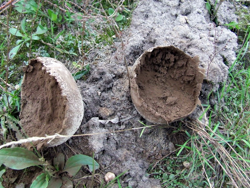 Lycoperdon utriforme. Karmėlava forest, Lithuania.